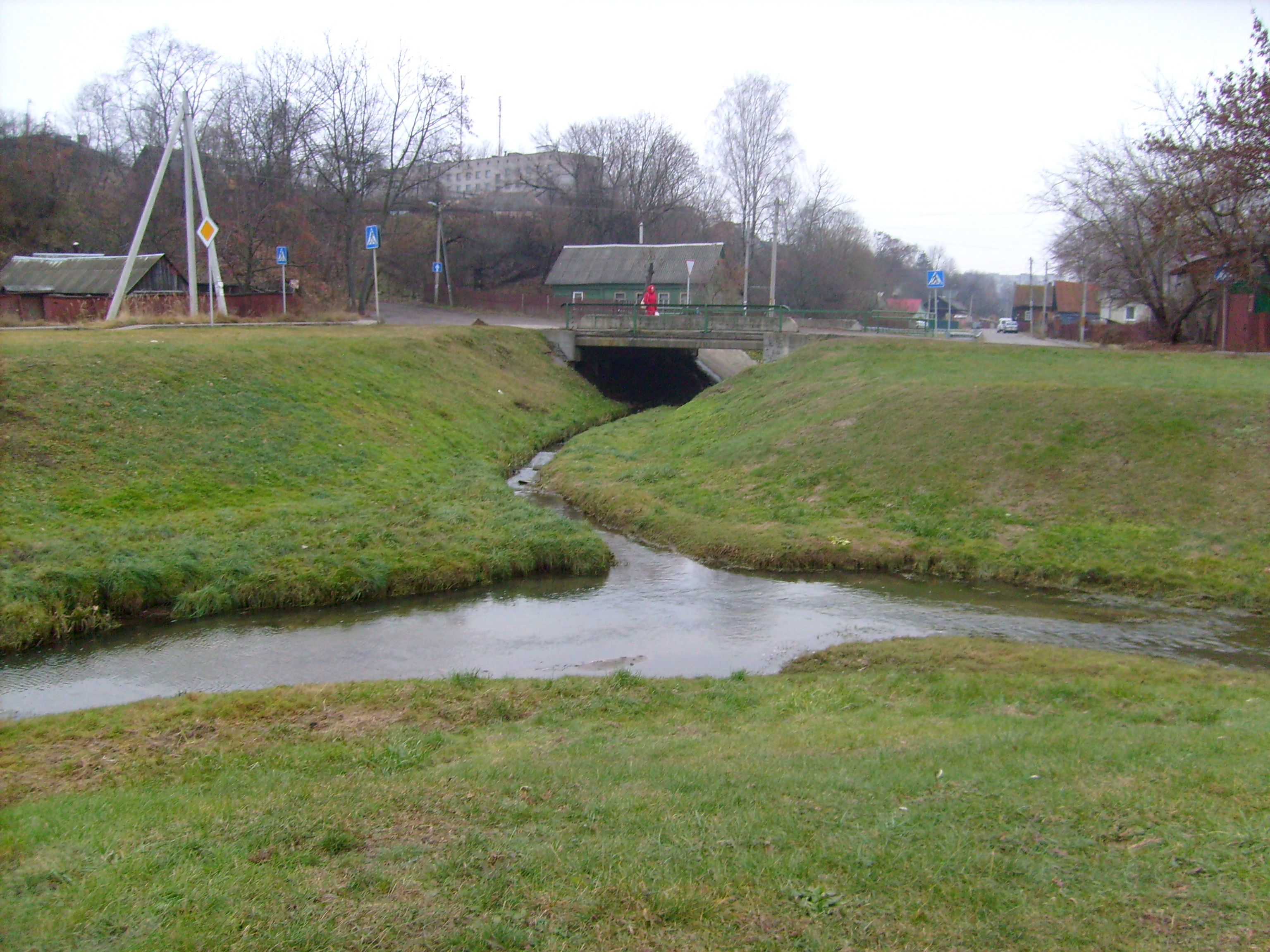 Место впадения Струшни в Дубровенку